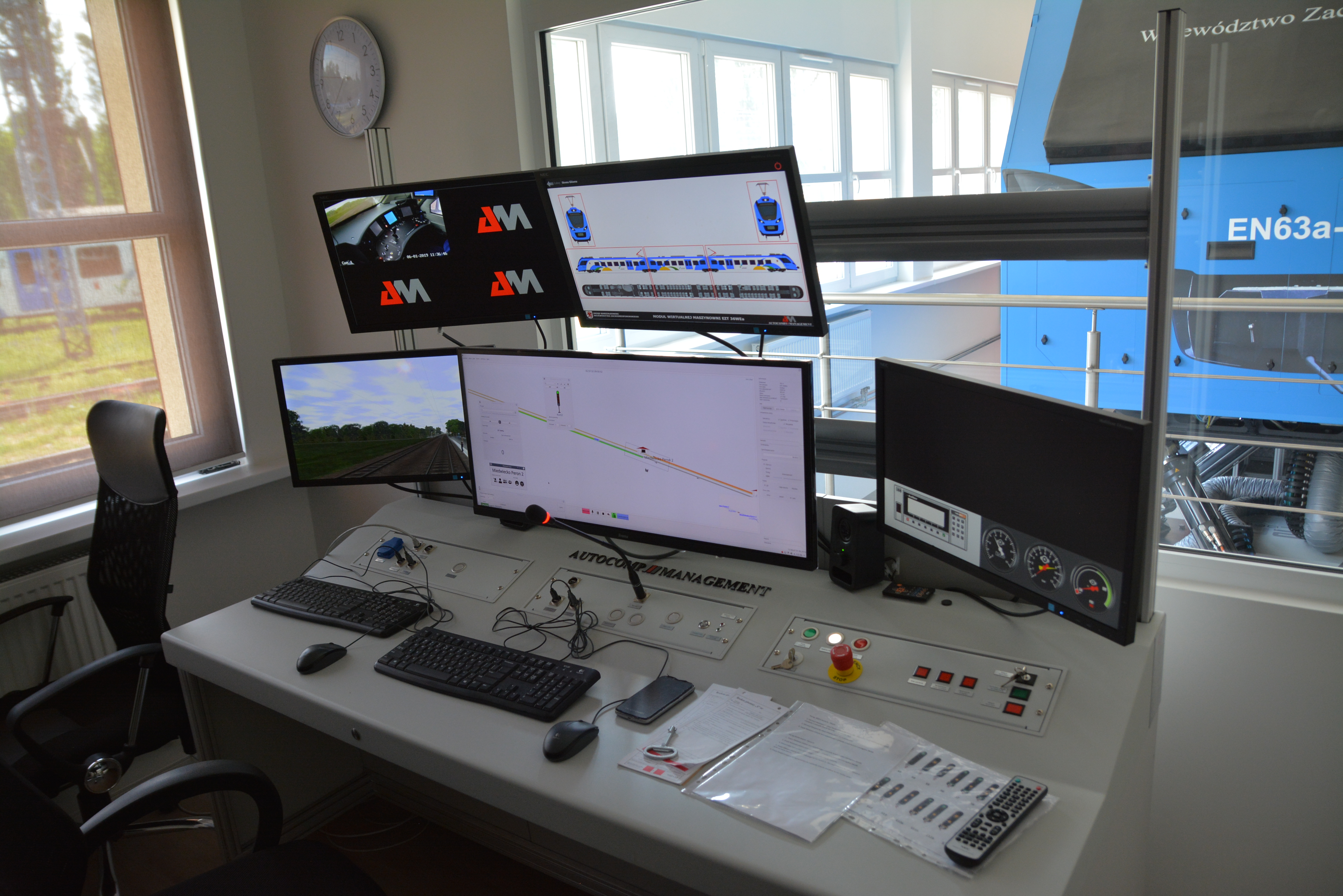 Symulator kierowania pociągiem w Centrum Szkolenia Maszynistów - Szczecin Wzgórze Hetmańskie